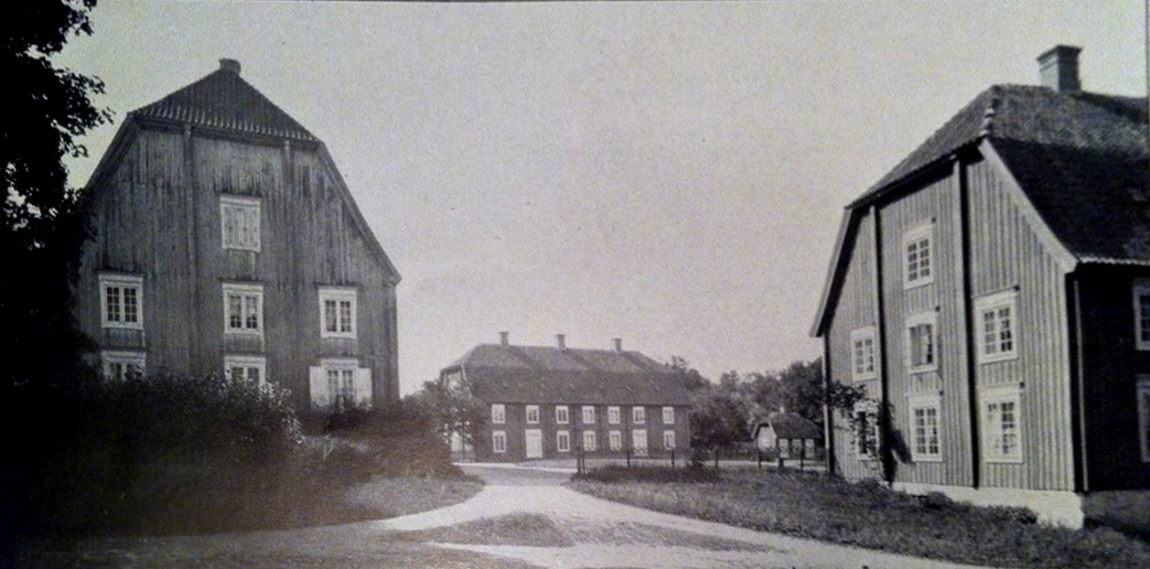 Strömsrums slott. Huvudbyggnad med båda flyglarna